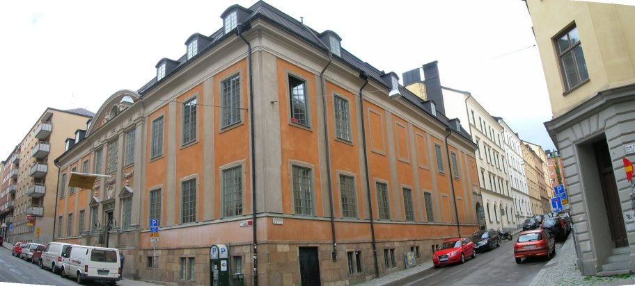 Van der Nootska palatset, built 1671-1672, Stockholm, Sweden.